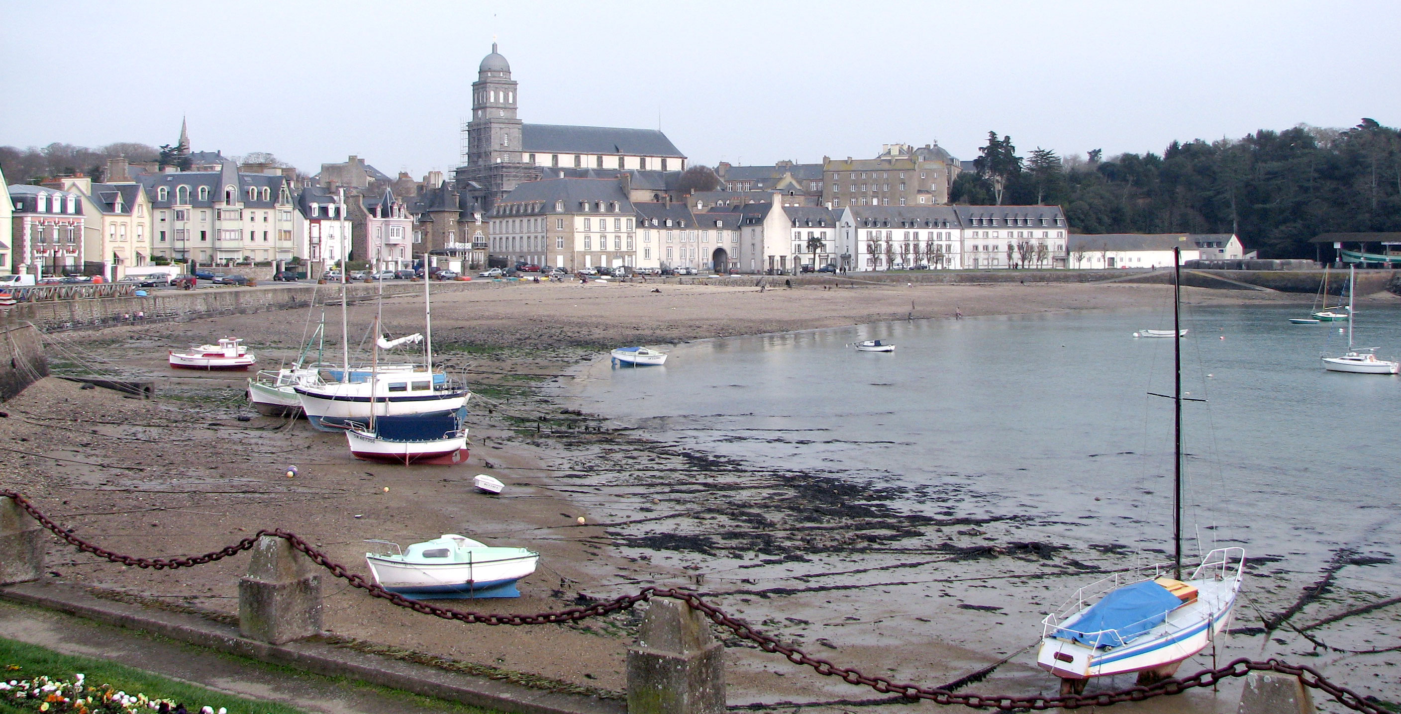 Saint-Servan